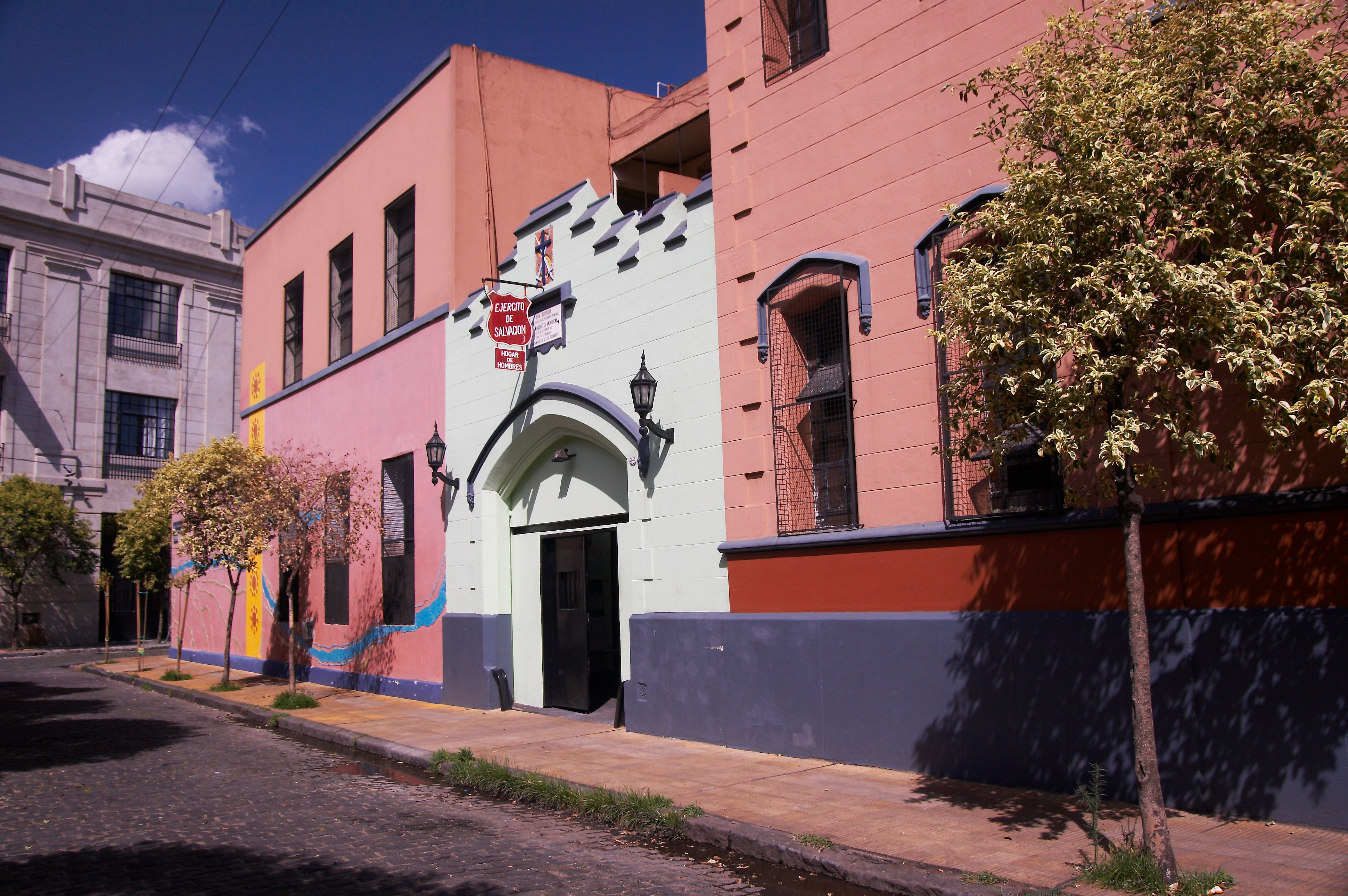 Templo del Ejército de Salvación, esquina de las calles Copahue y Lanín, barrio de Barracas, Buenos Aires, Argentina.